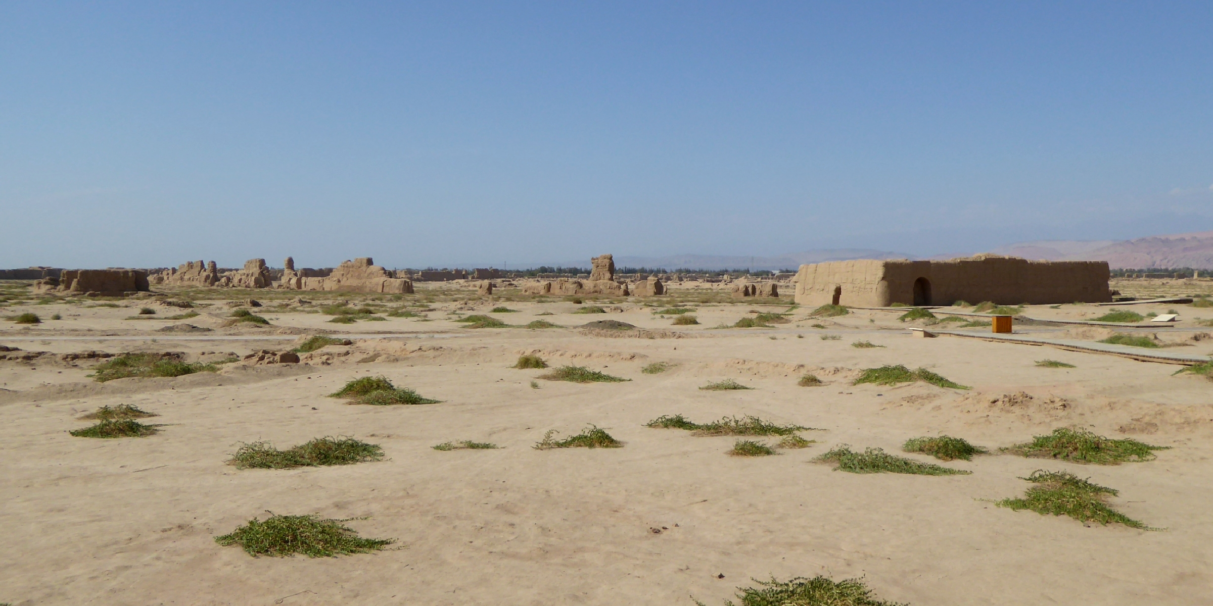 Gaochang Ruins Turpan Xinjiang China 新疆 吐魯番 高昌故城